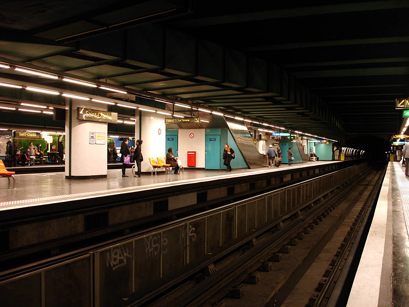 Station Saint-Charles du métro de Marseille, France.